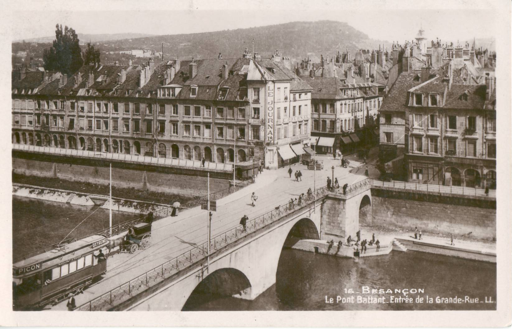 Carte postale ancienne éditée par LL, n°16Besançon - Le Pont Battant - Entrée de la Grande-Rue